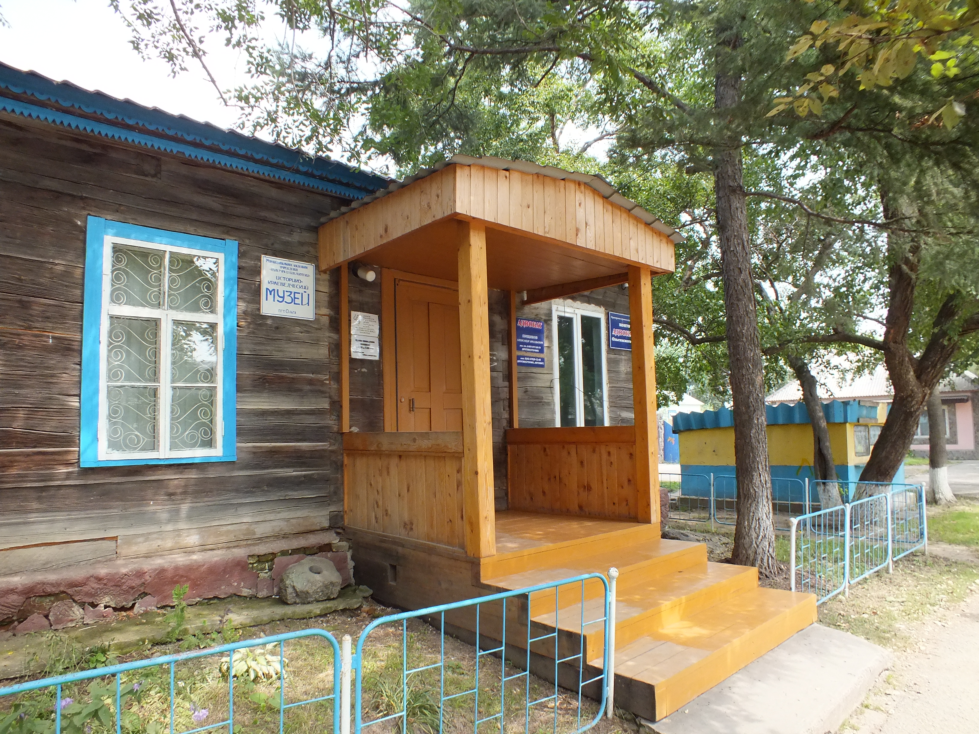 Olga, Primorsky krai